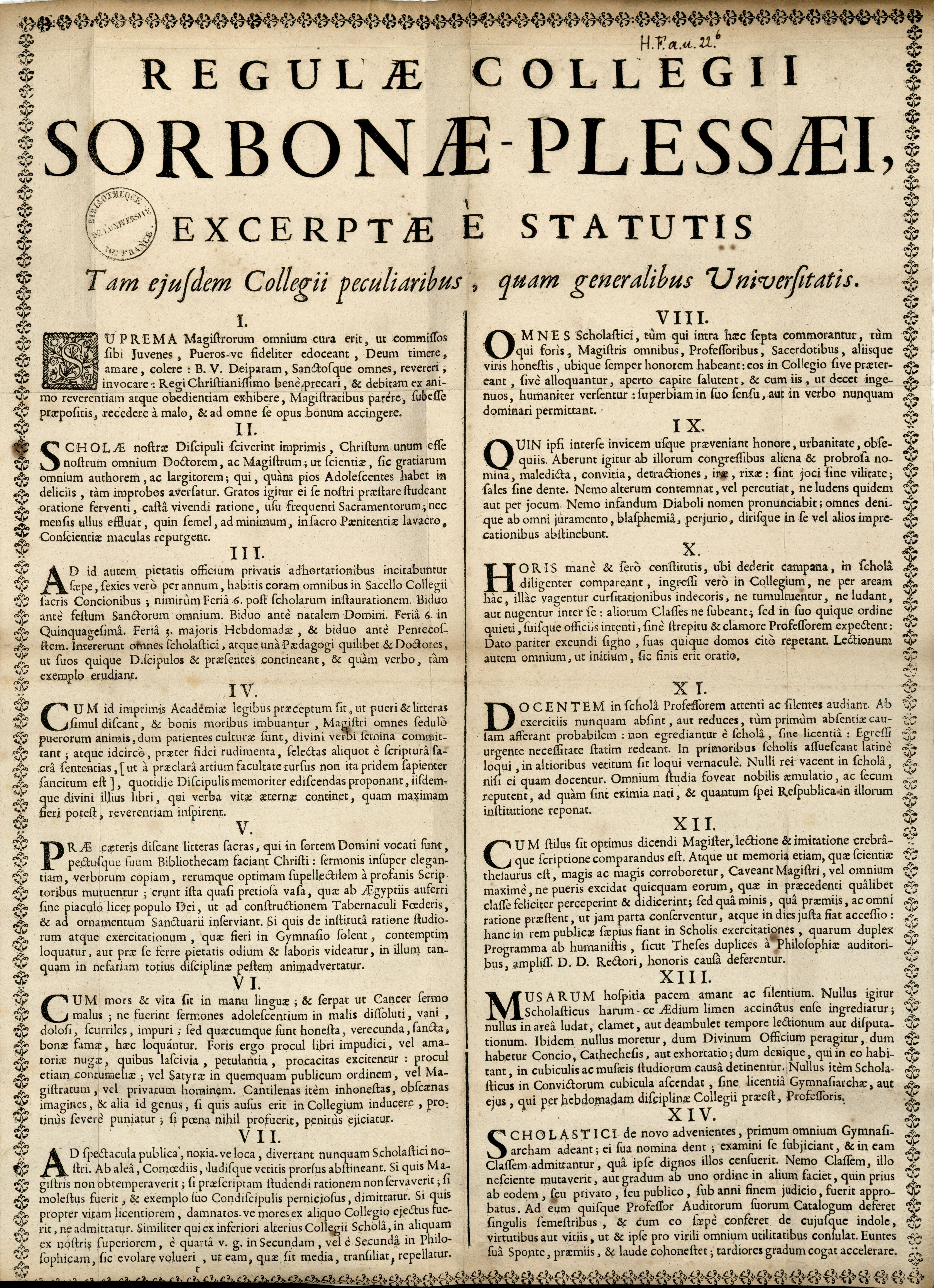 Monographie imprimée en latin, dans un recueil de 17 pièces imprimées.